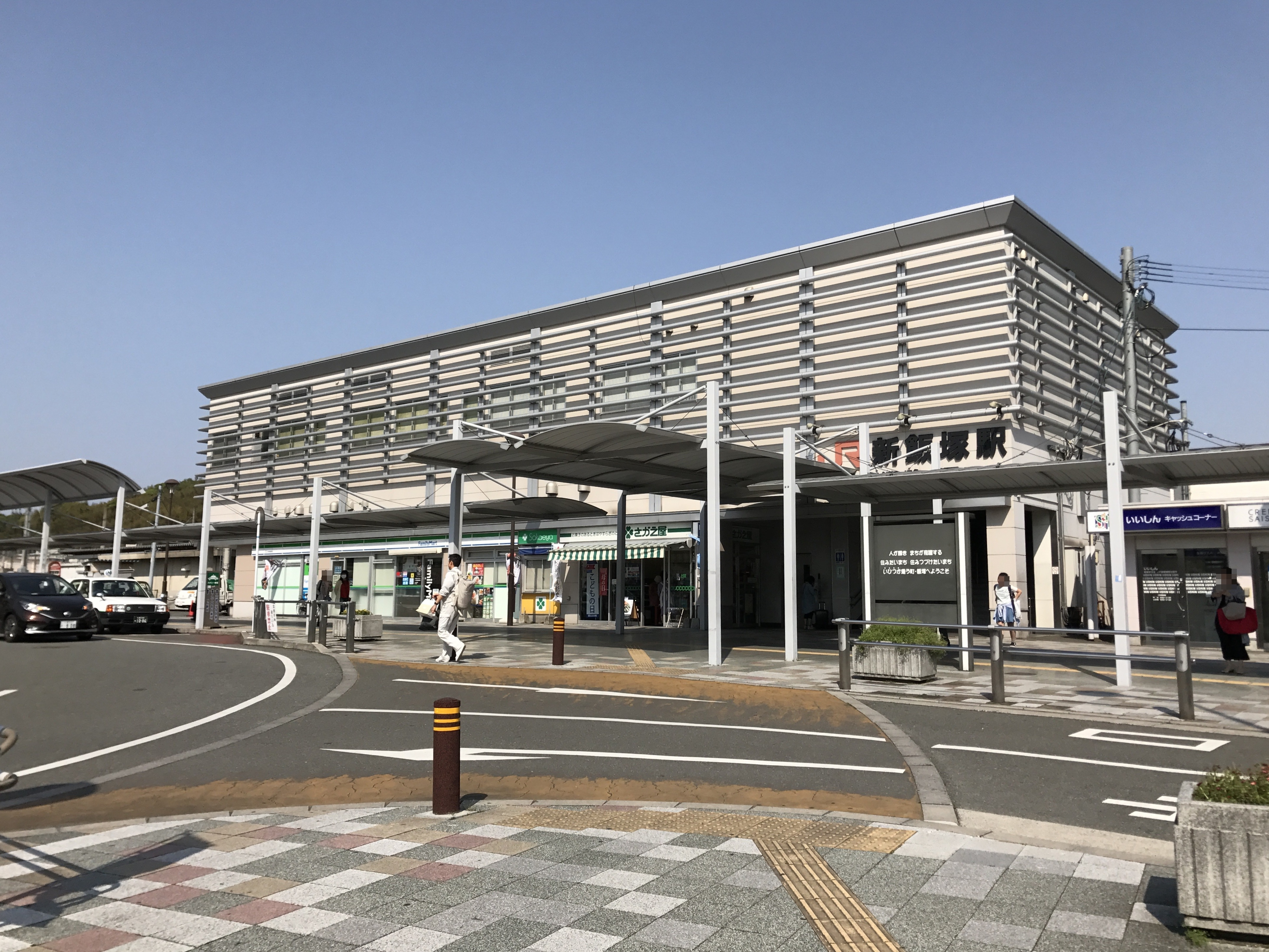 新飯塚駅駅舎